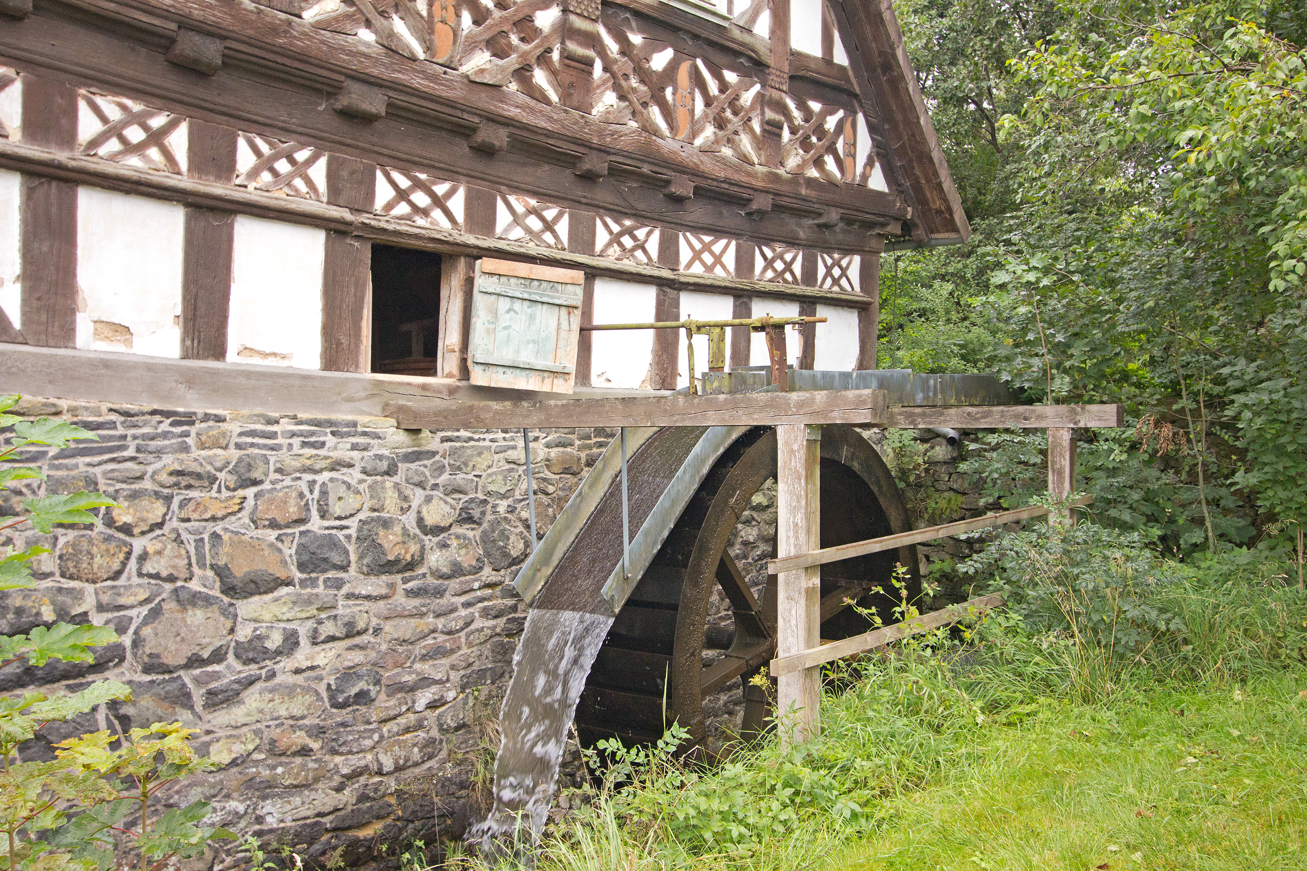 Wasserrad der Teufelsmühle in Ilbeshausen im Vogelsberg.